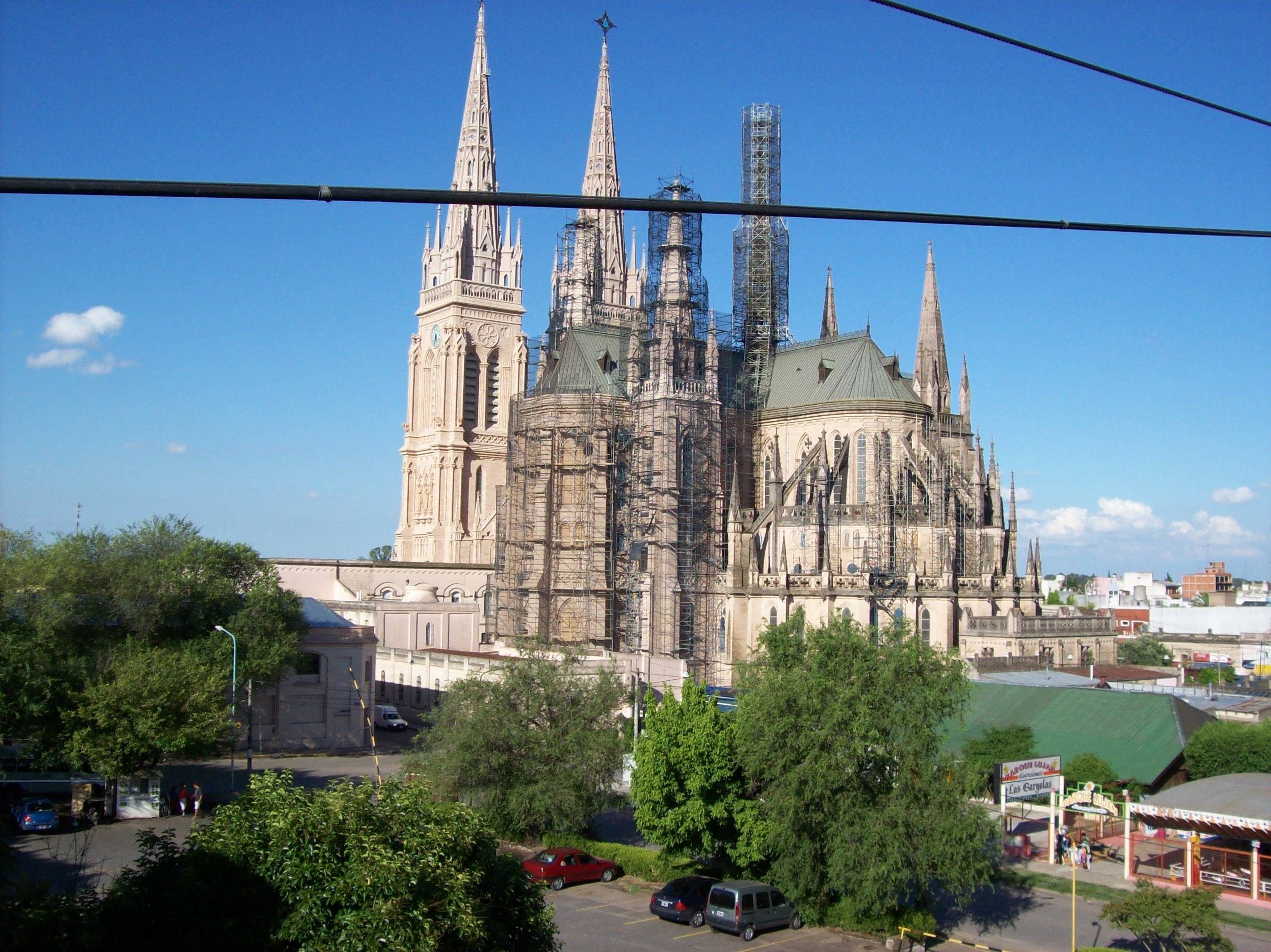 Lateral oeste y parte posterior de la Basílica Nuestra Señora de Luján, visto desde la telesilla. Foto tomada en Luján, provincia de Buenos Aires, Argentina.